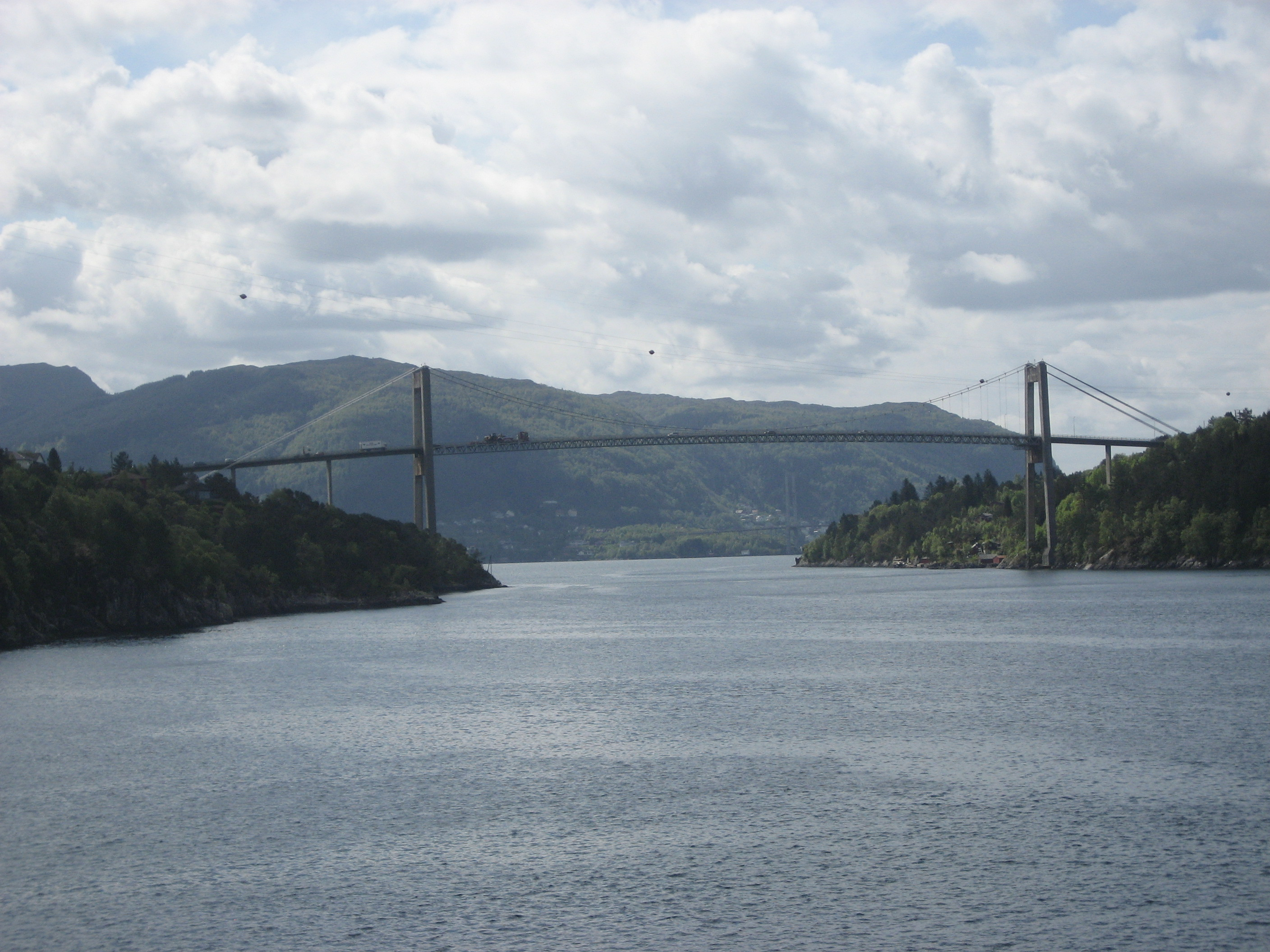 Hagelsundbrua